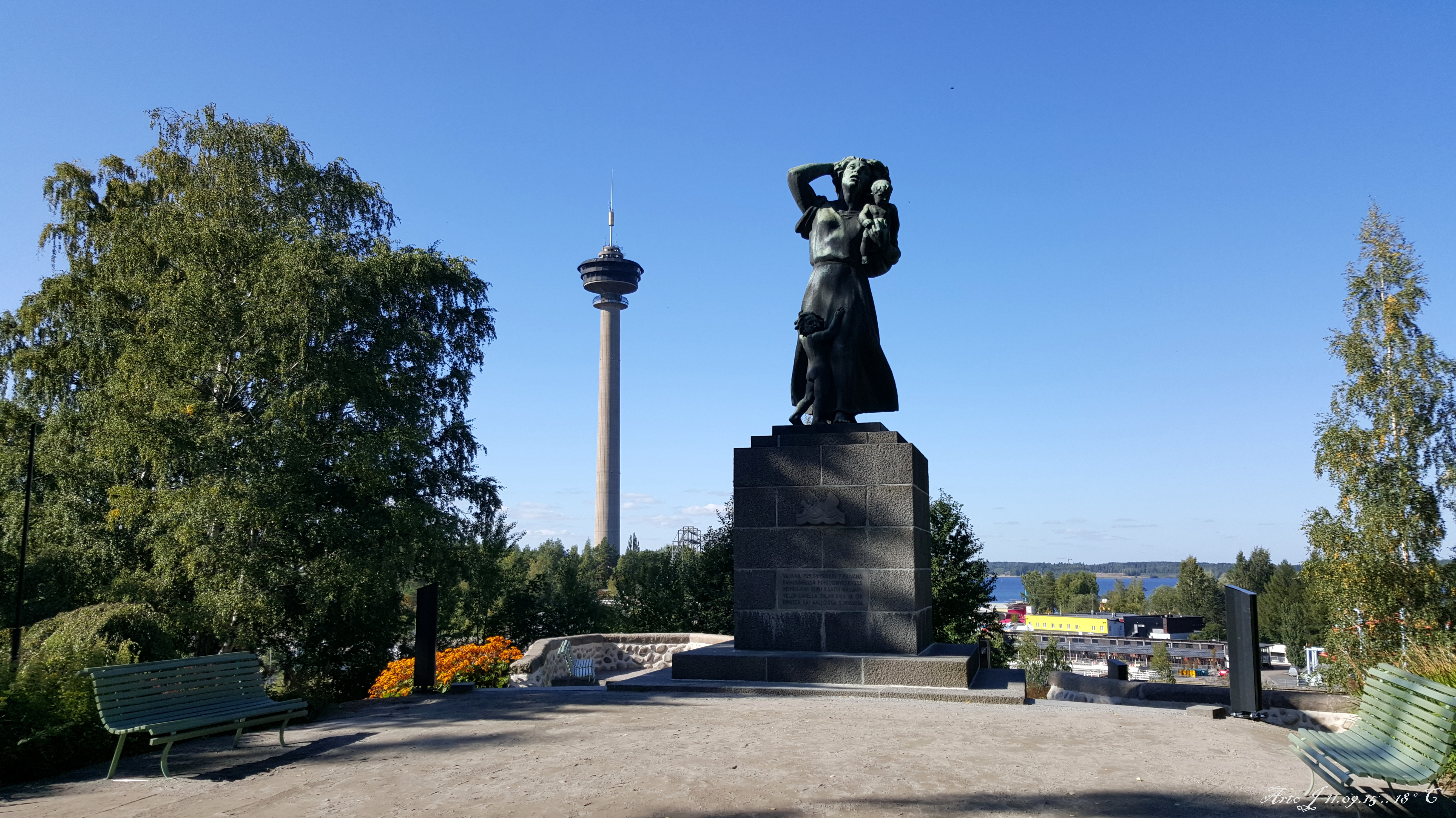 Tampere - Näsinpuisto